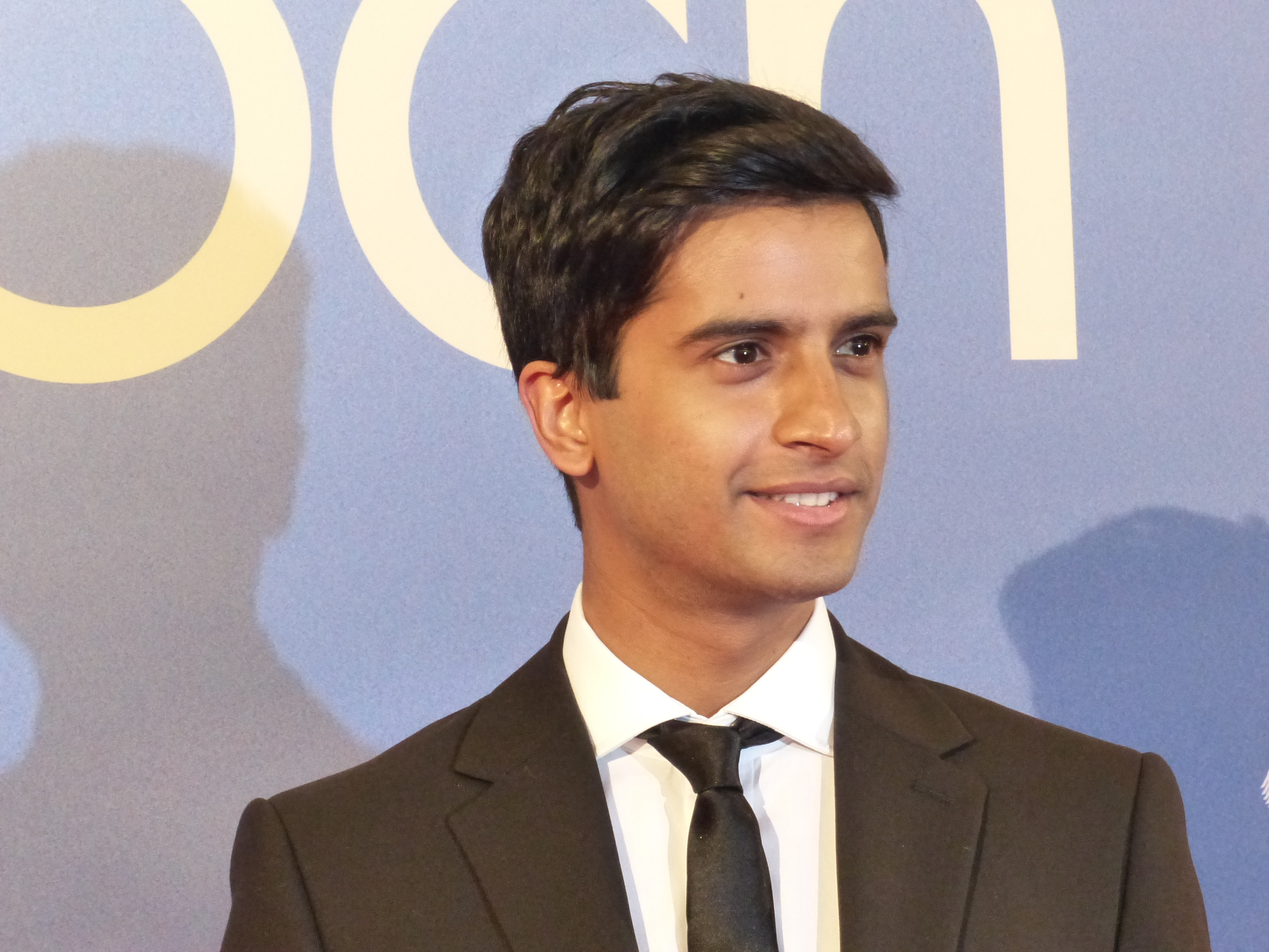 Hamza Jeetooa bei der Premiere von "Der Koch", November 2014